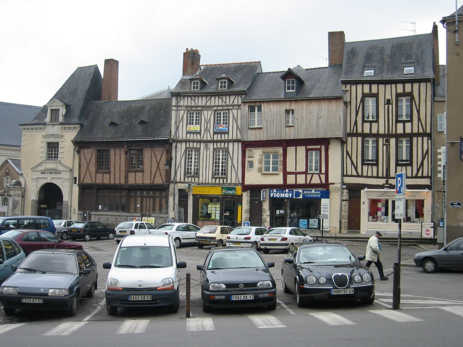 Place de la Trémoille, Laval, Mayenne, France.